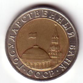 Государственный банк СССР - 10 рублей 1991